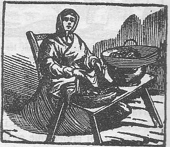 Tret d'una auca vuit-centista i per tant sense drets d'autor.